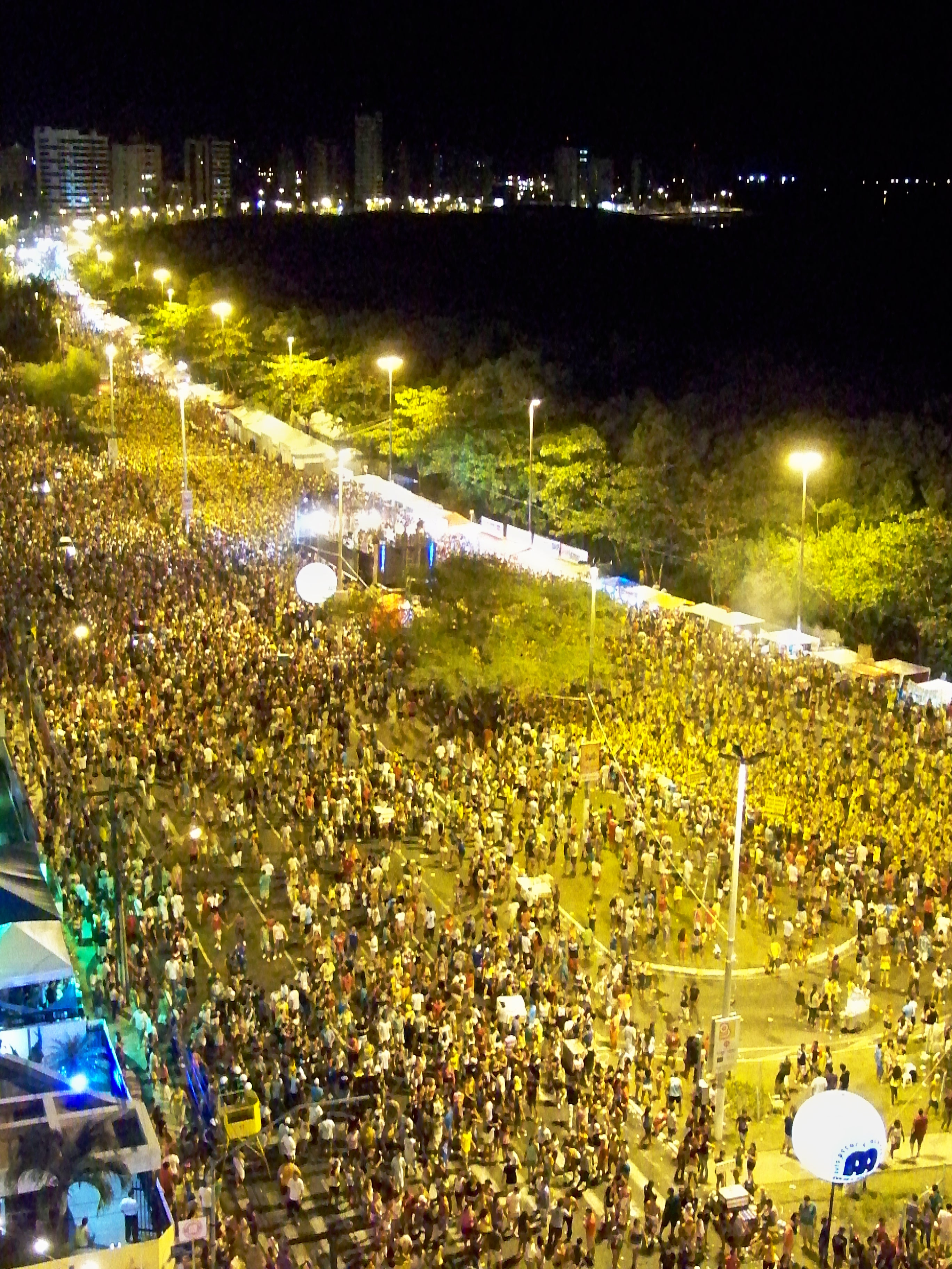 Vista da Avenida 13 de Julho no Segundo dia de Festa (2010)